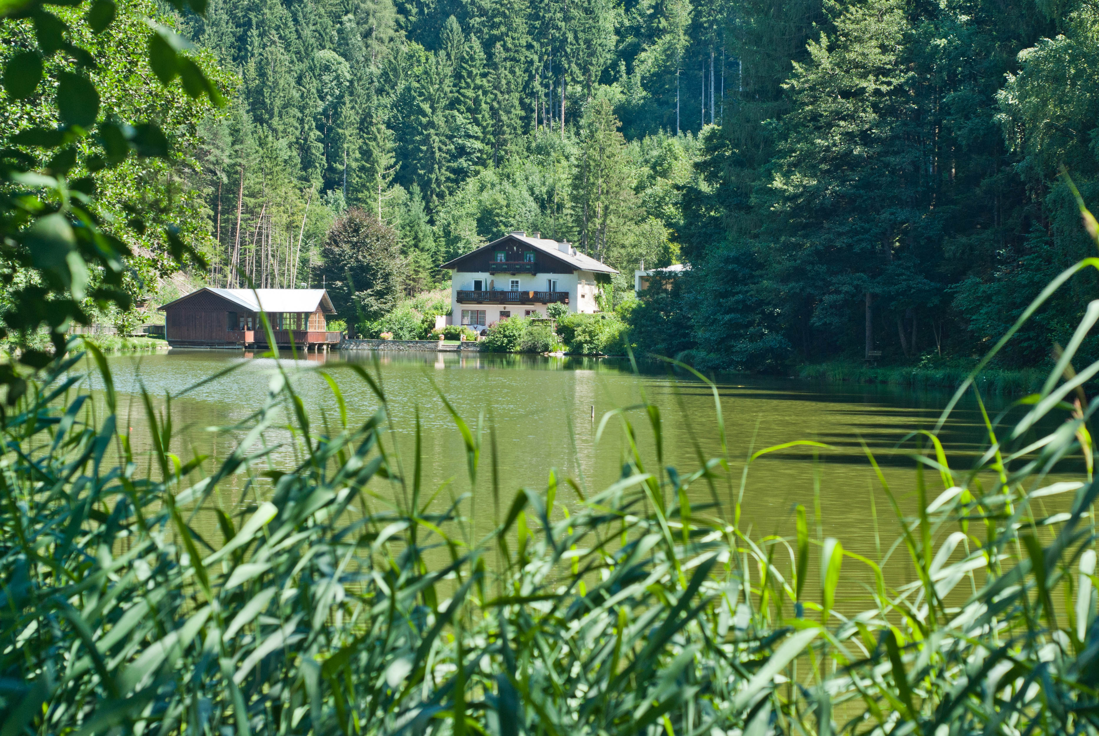 Der Herzsee bei Aldrans vom Westufer aus